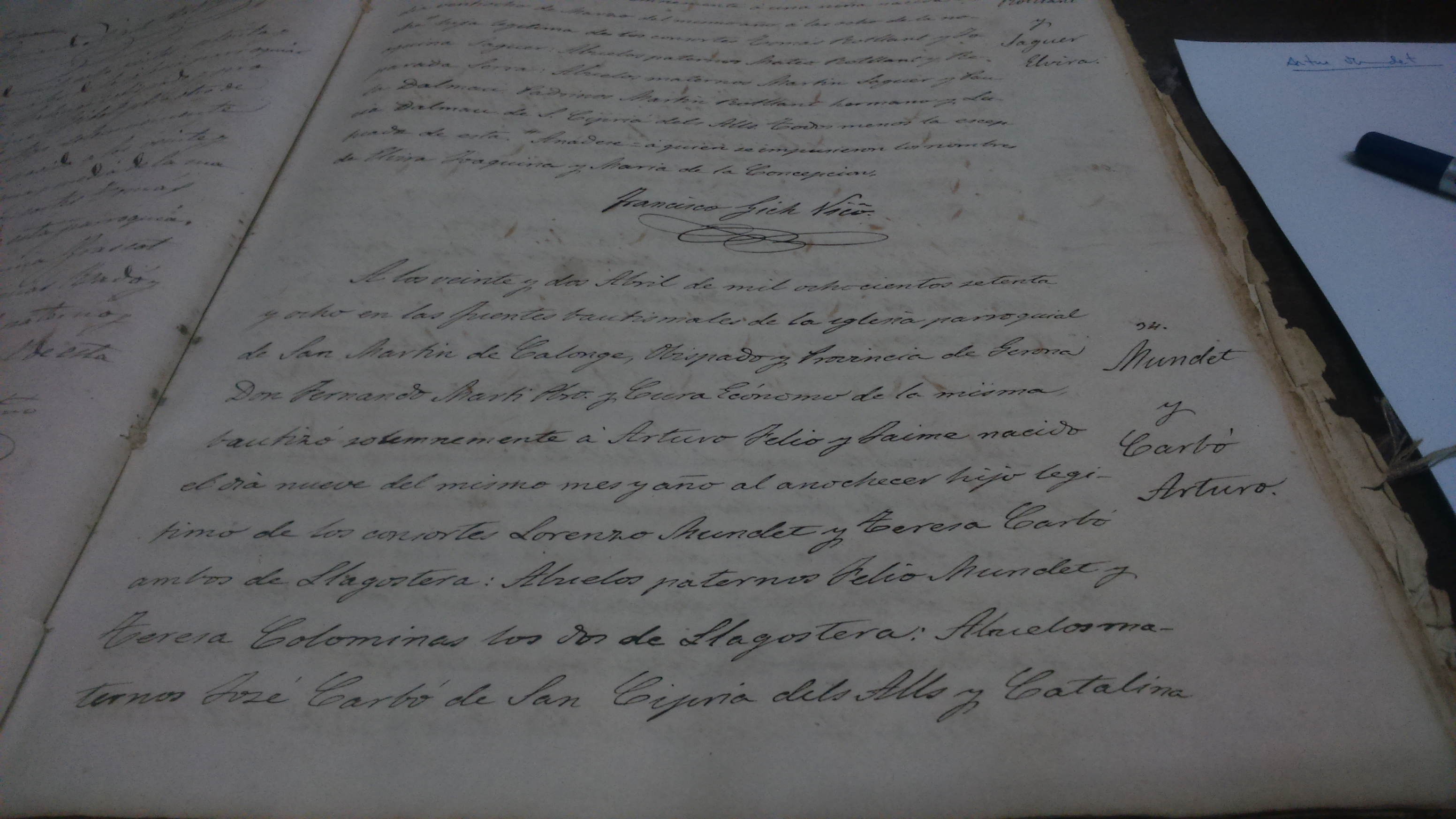 Partida de baptisme d'Artur Mundet, a la parròquia de Calonge. 1878.